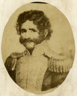 Reproducción de un conocido retrato pictórico del caudillo riojano argentino apodado "El tigre de los llanos".